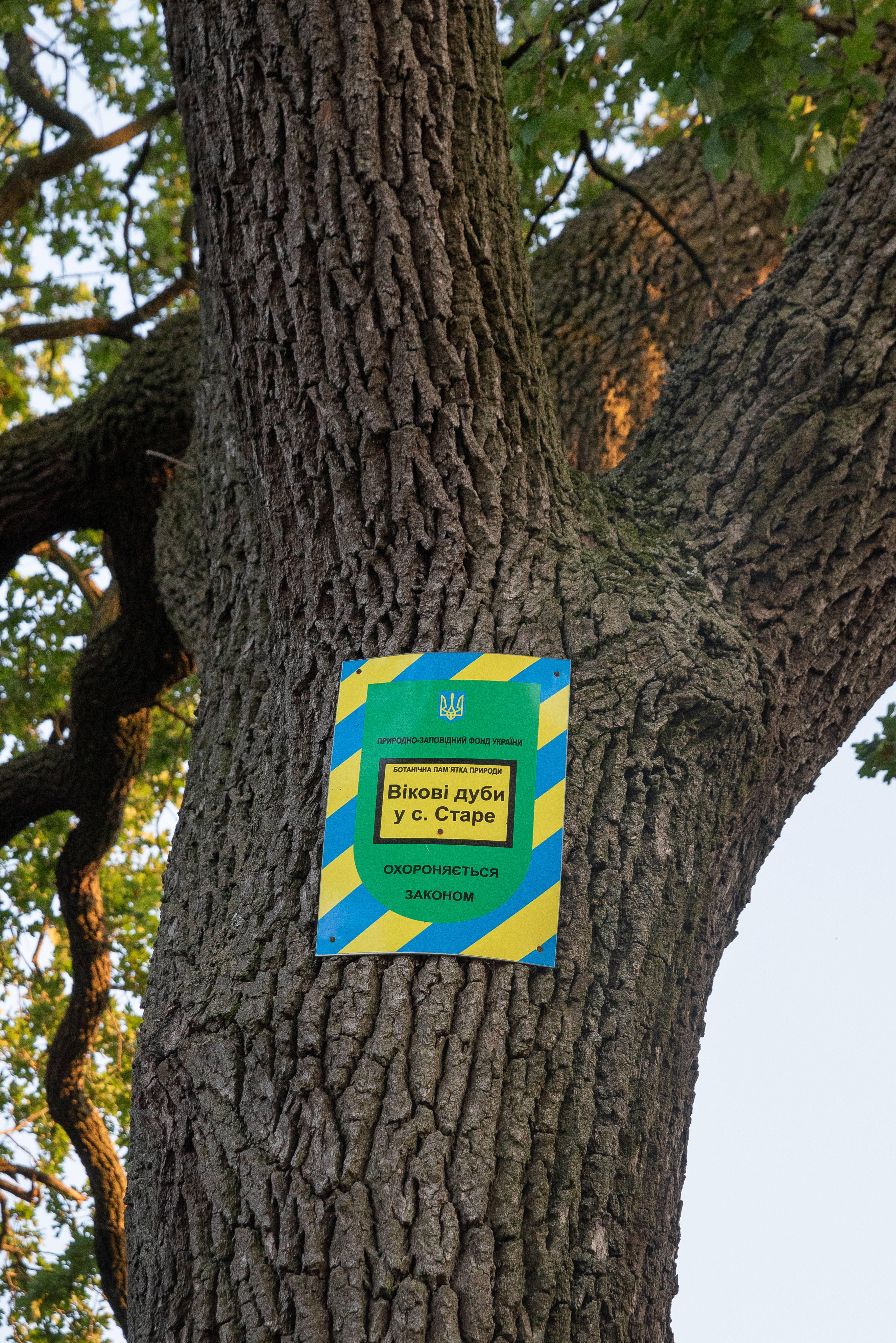 Три дуби, Старинська сільська рада Бориспільського району